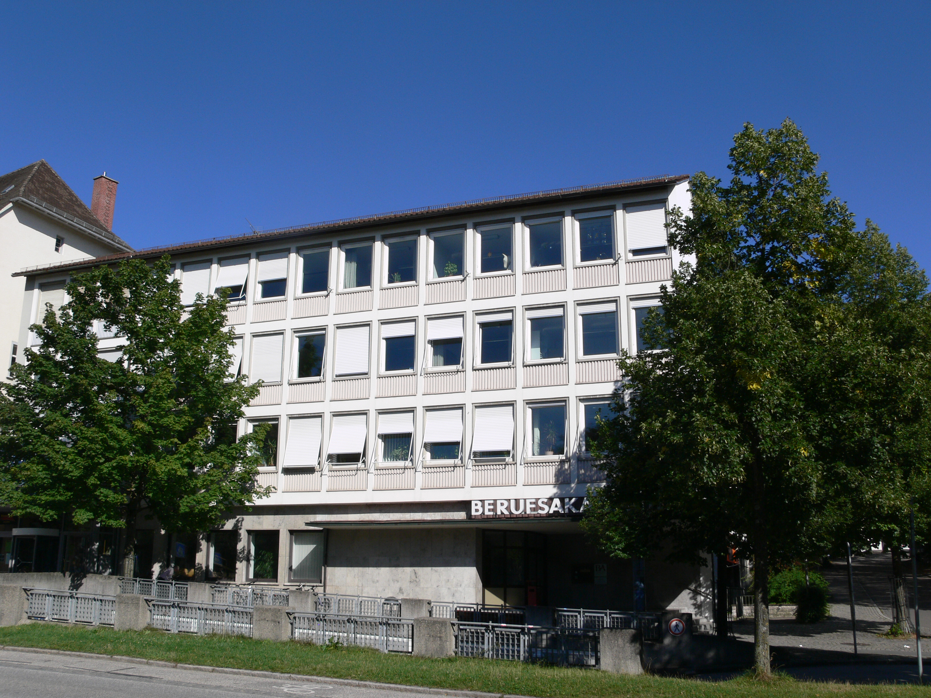 Ravensburg Marienplatz, Berufsakademie (erbaut als Hauptstelle der Kreissparkasse Ravensburg)